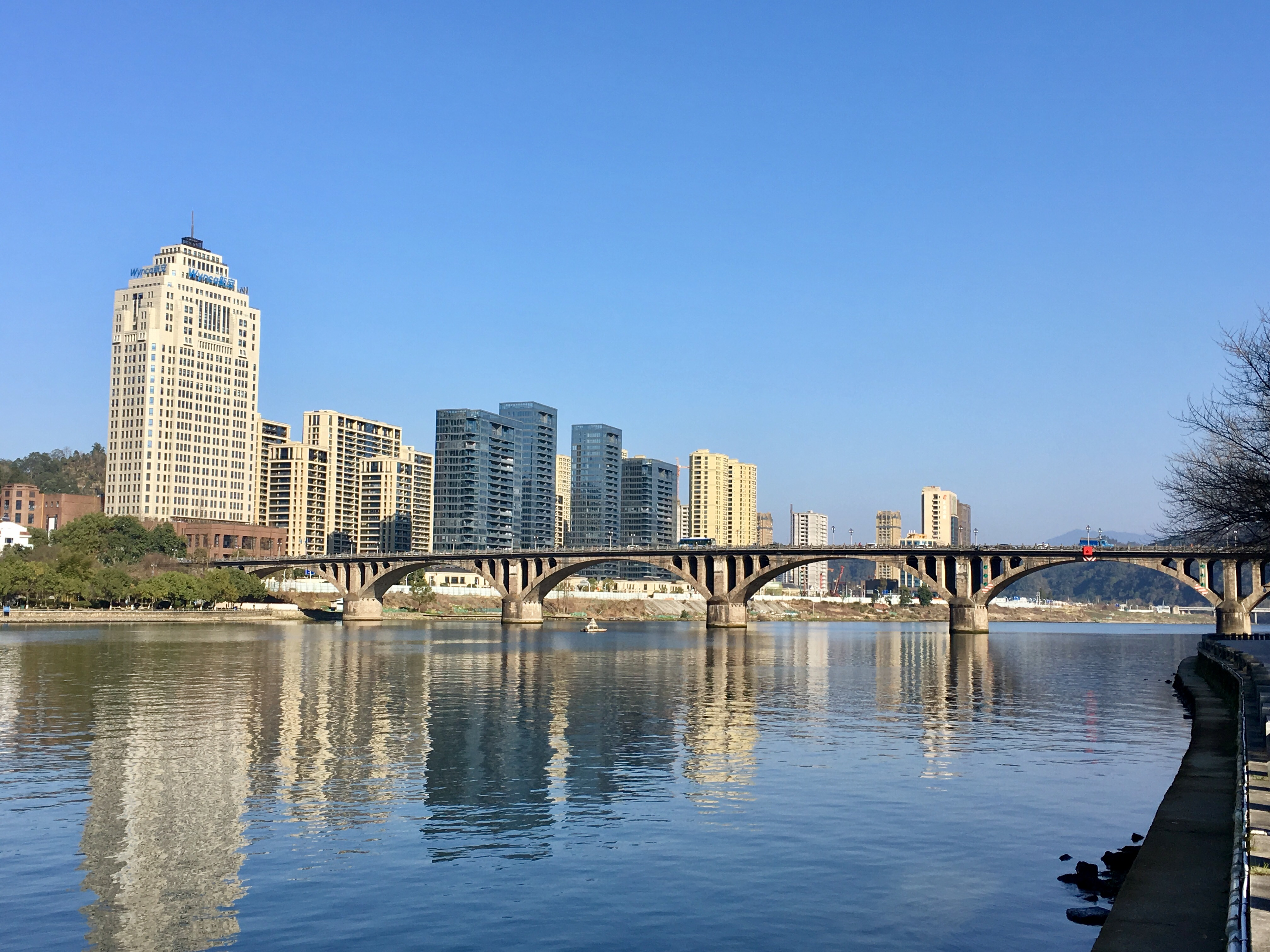 中文（中国大陆）: 建德市新安江上的白沙大桥